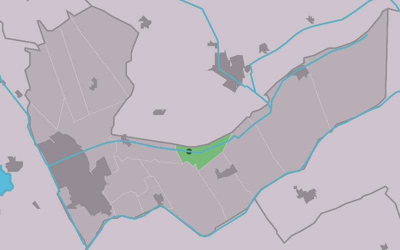 Kaartsje fan himrik fan Bontebok